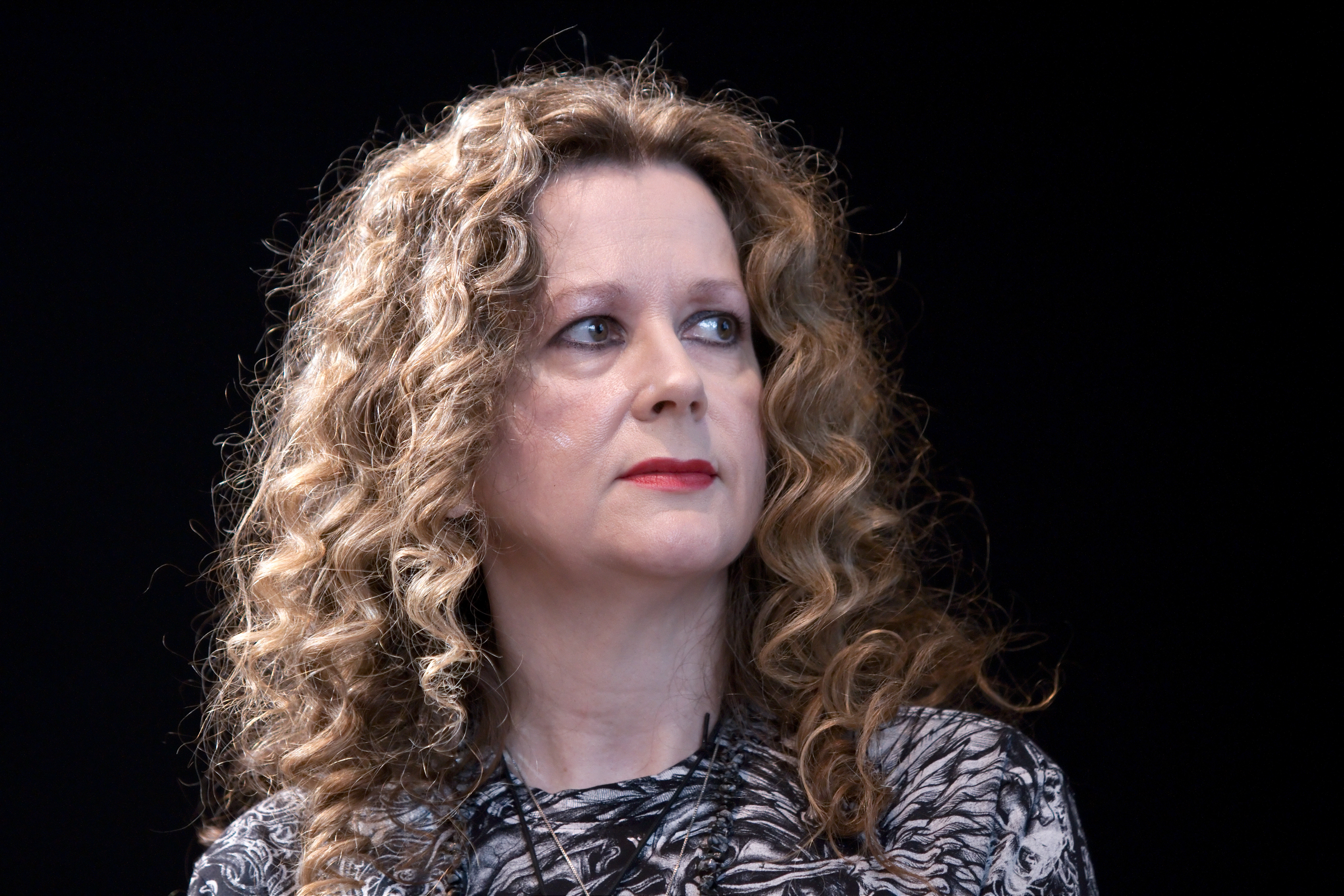 L'auteur Laurell K. Hamilton lors du Salon du livre de Paris pour le débat Vampire, vous avez dit vampire ?